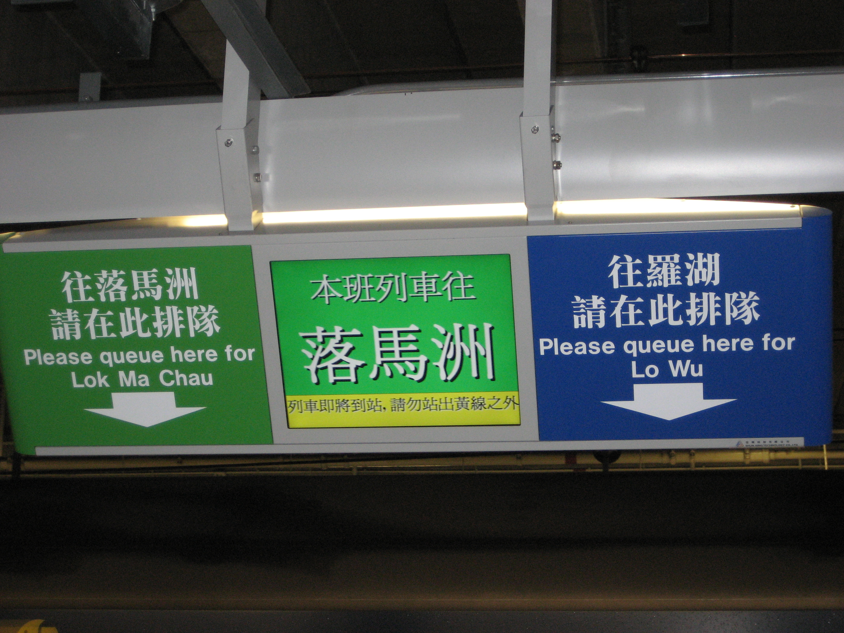 九廣鐵路上水站北行月台分隔前往羅湖站及落馬洲站乘客的排隊指示。